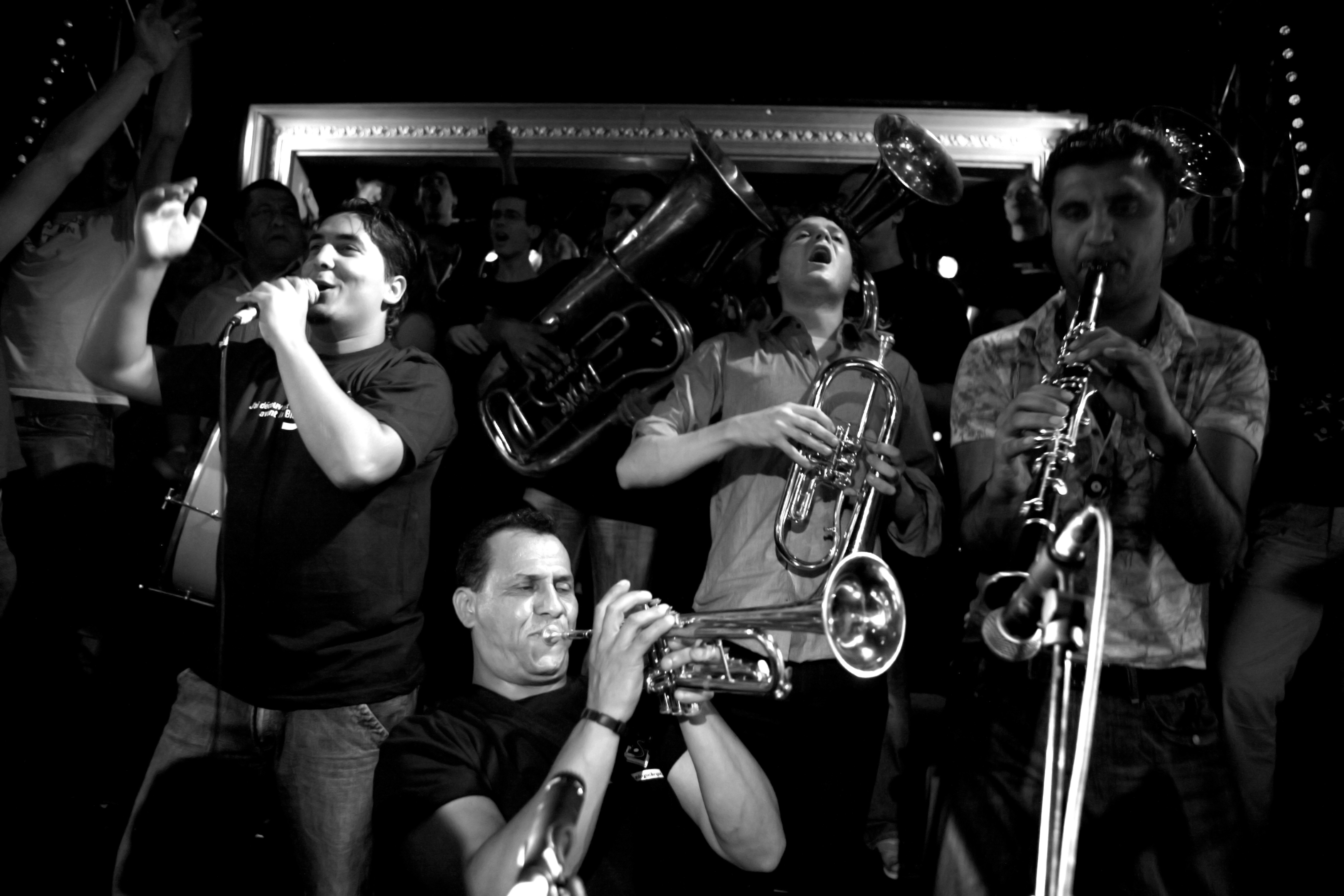 Kočani Orkestar performing.